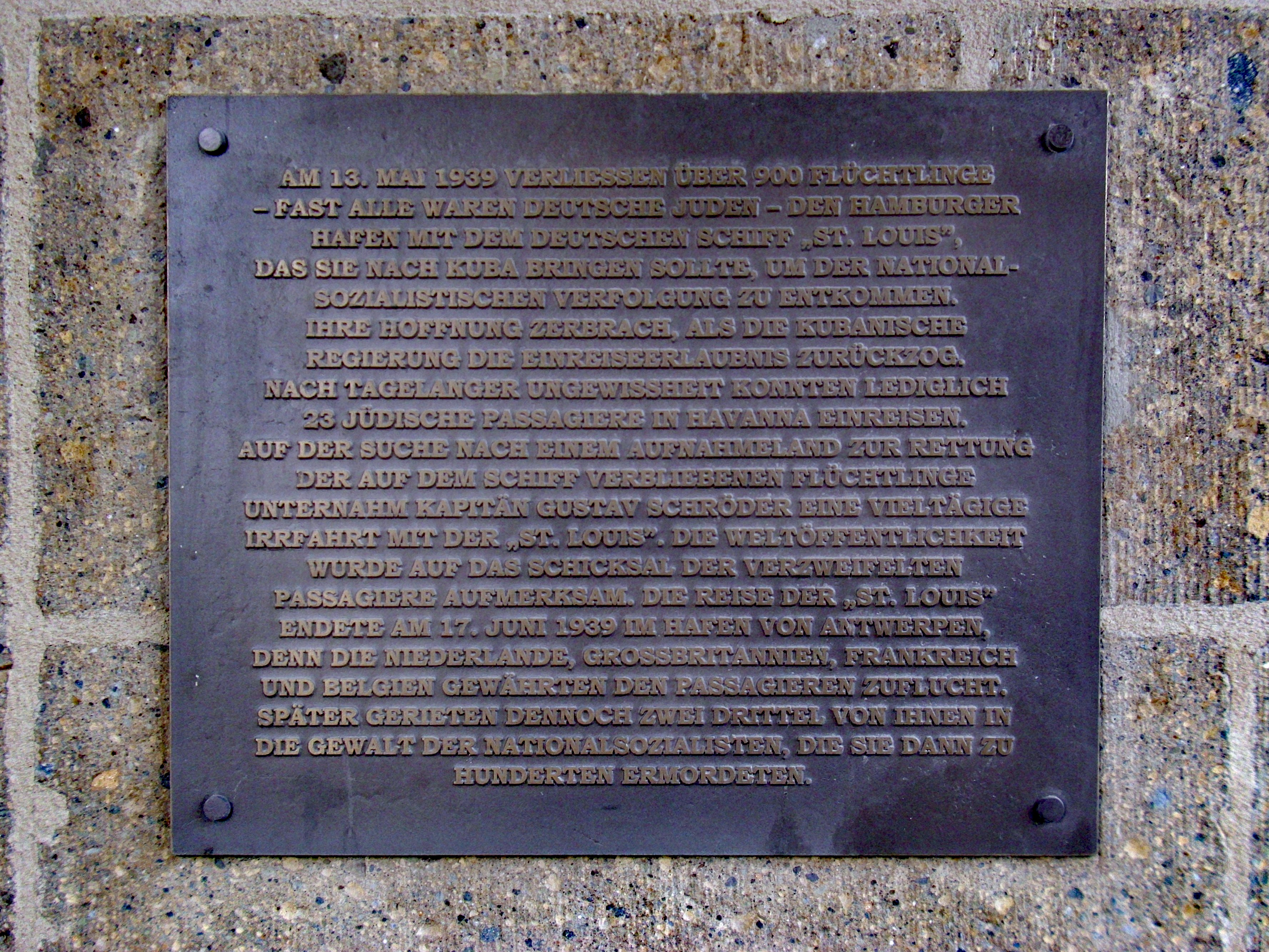 Gedenktafel zur Erinnerung an die Passagiere der St. Louis auf der rechten Seite des Durchganges zu Brücke 3 der St. Pauli-Landungsbrücken.